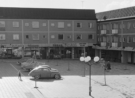 Vy över Blackebergs torg med biogrfafen "Kaskad" i bakgrunden.